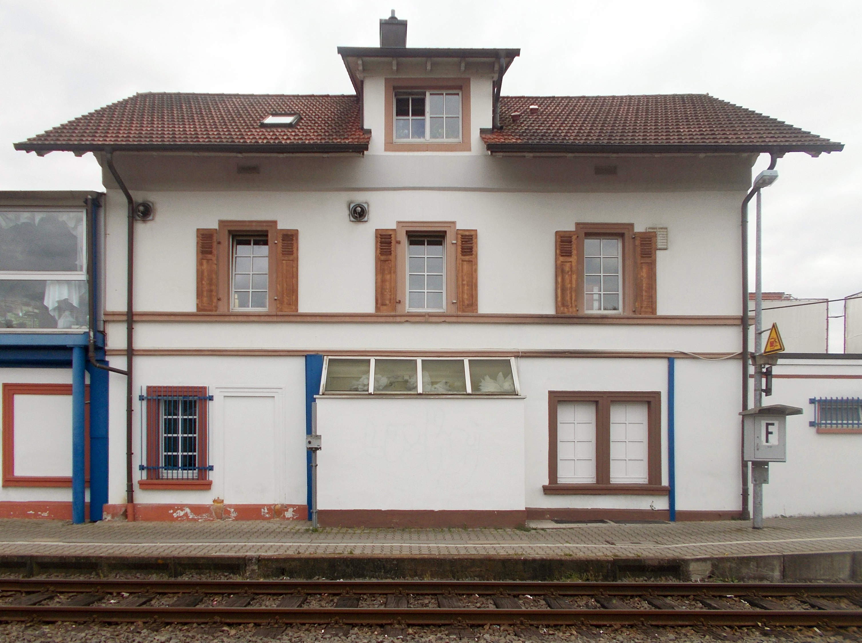 Bahnhof Ramstein, eröffnet 1868 an der Steinbahn